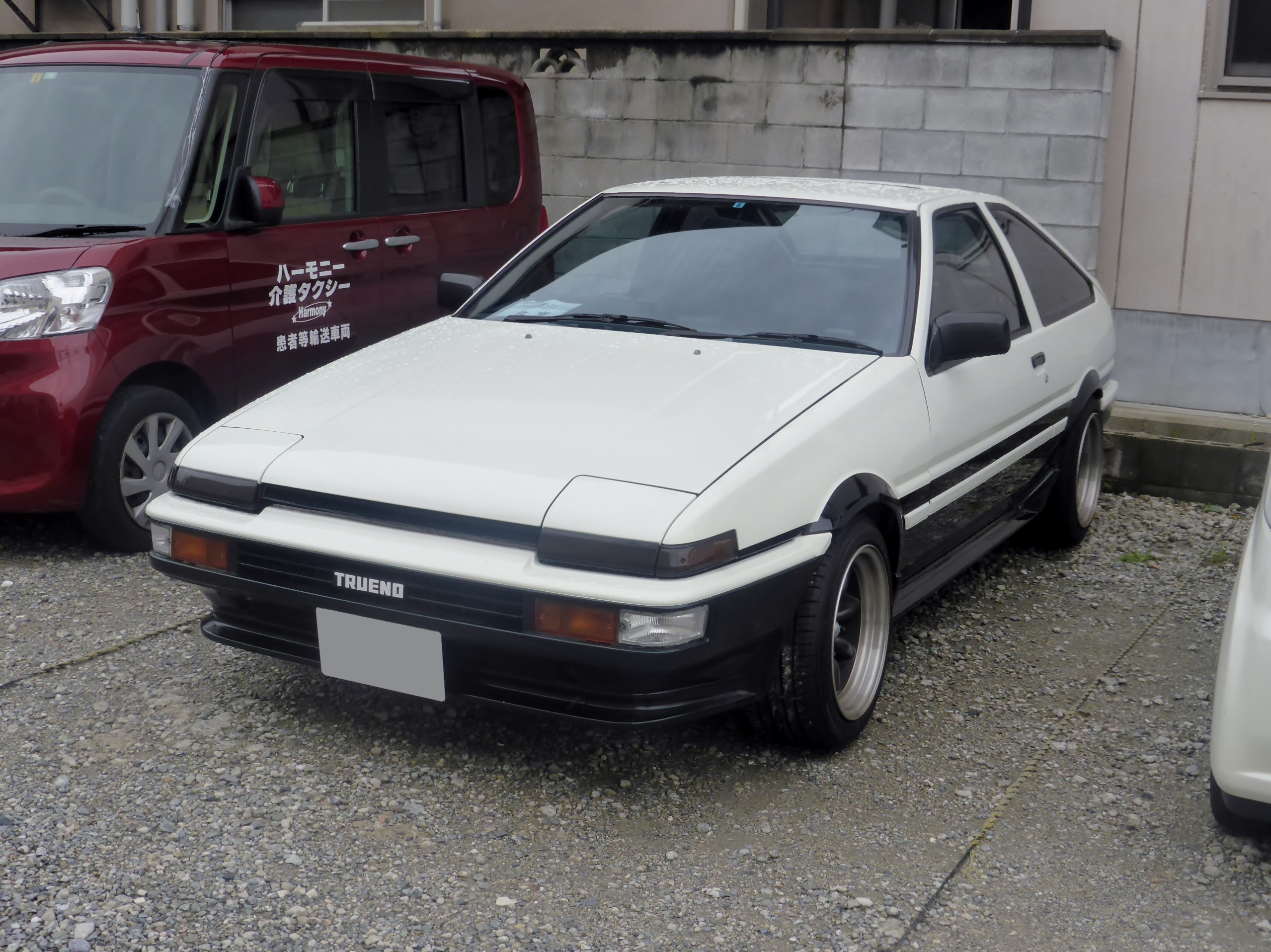 AE86型トヨタ・スプリンタートレノ3ドアをフロントから撮影。